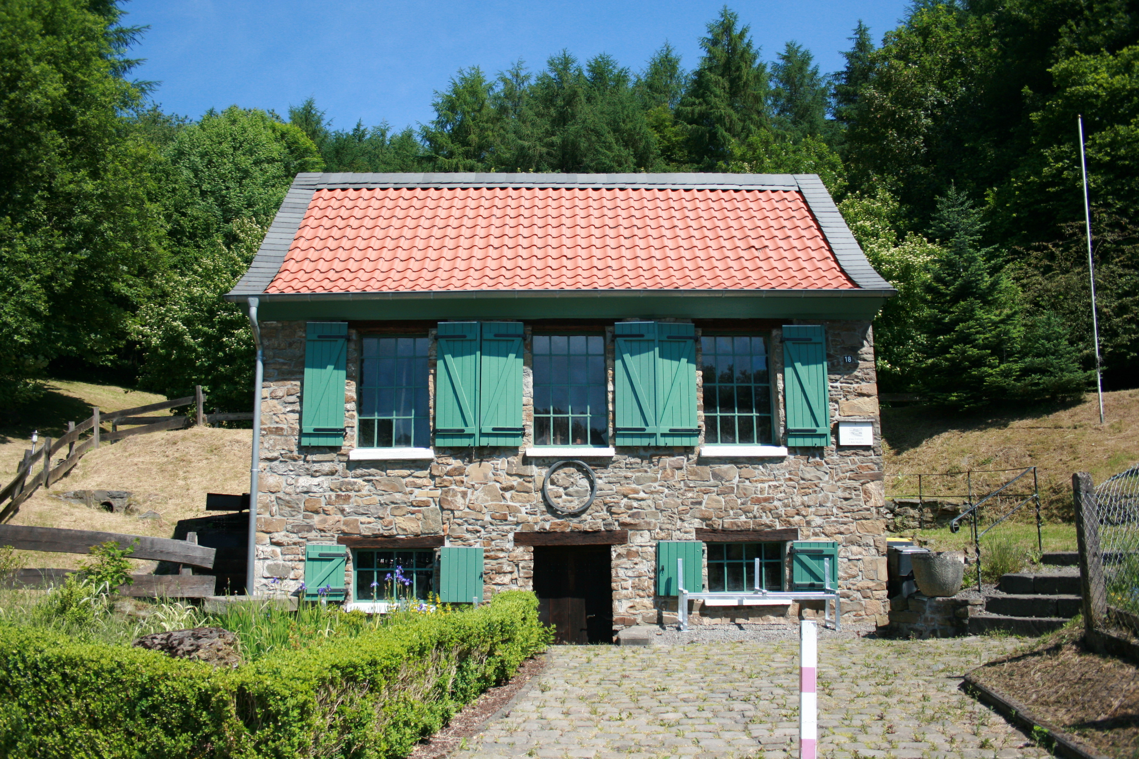 Drahtrolle am Hurk, Im Springen in Altena-Evingsen